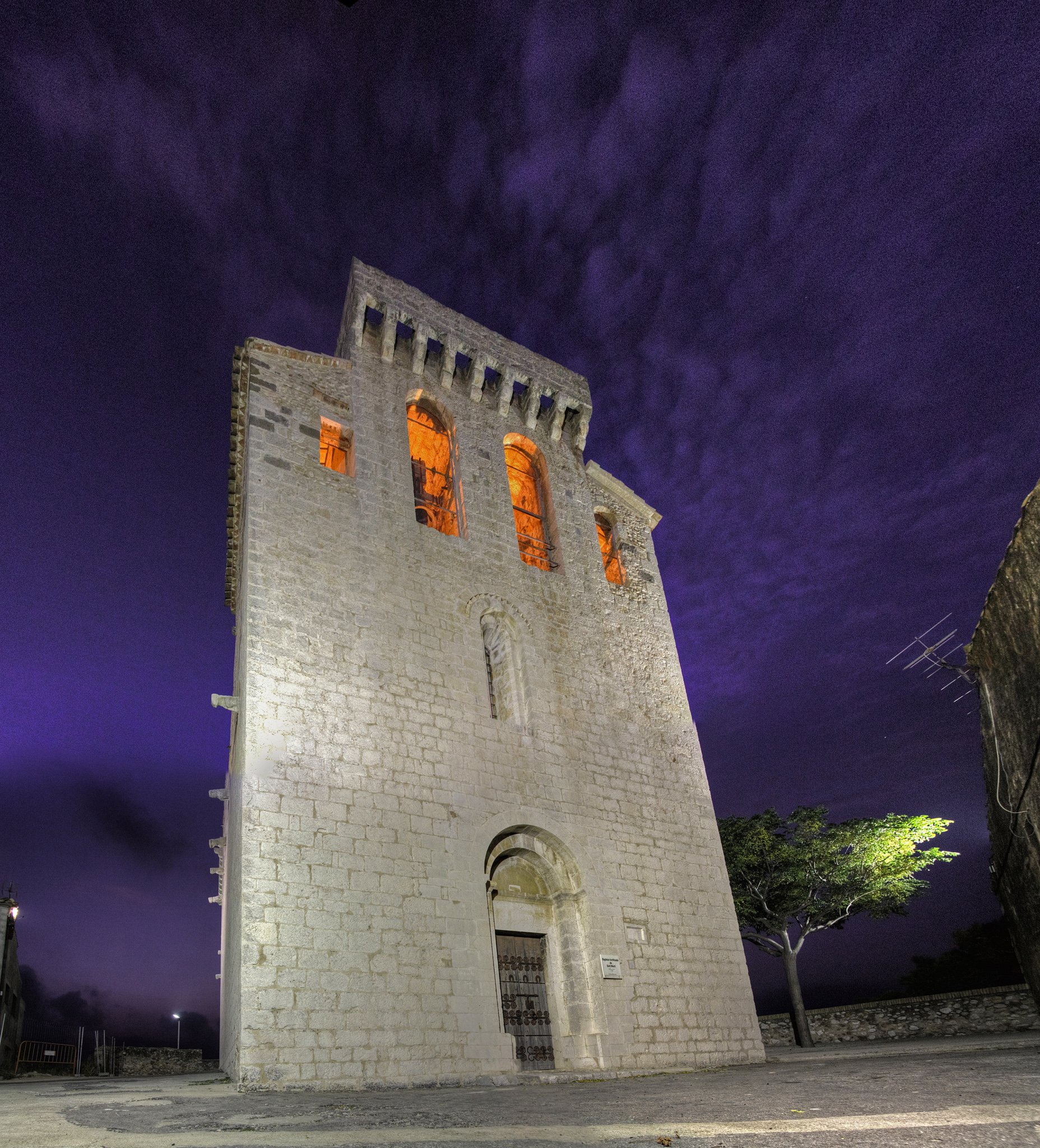 Esglèsia de Sant Martí del Far, el Far d'Empordà (Alt Empordà)